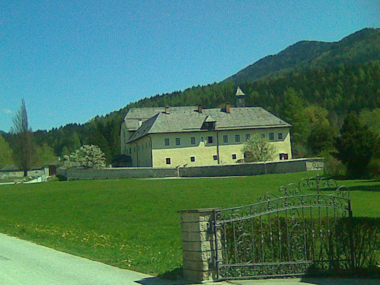 Kapuzinerkloster Falkenburg, Irdning, mit Blickrichtung Osten